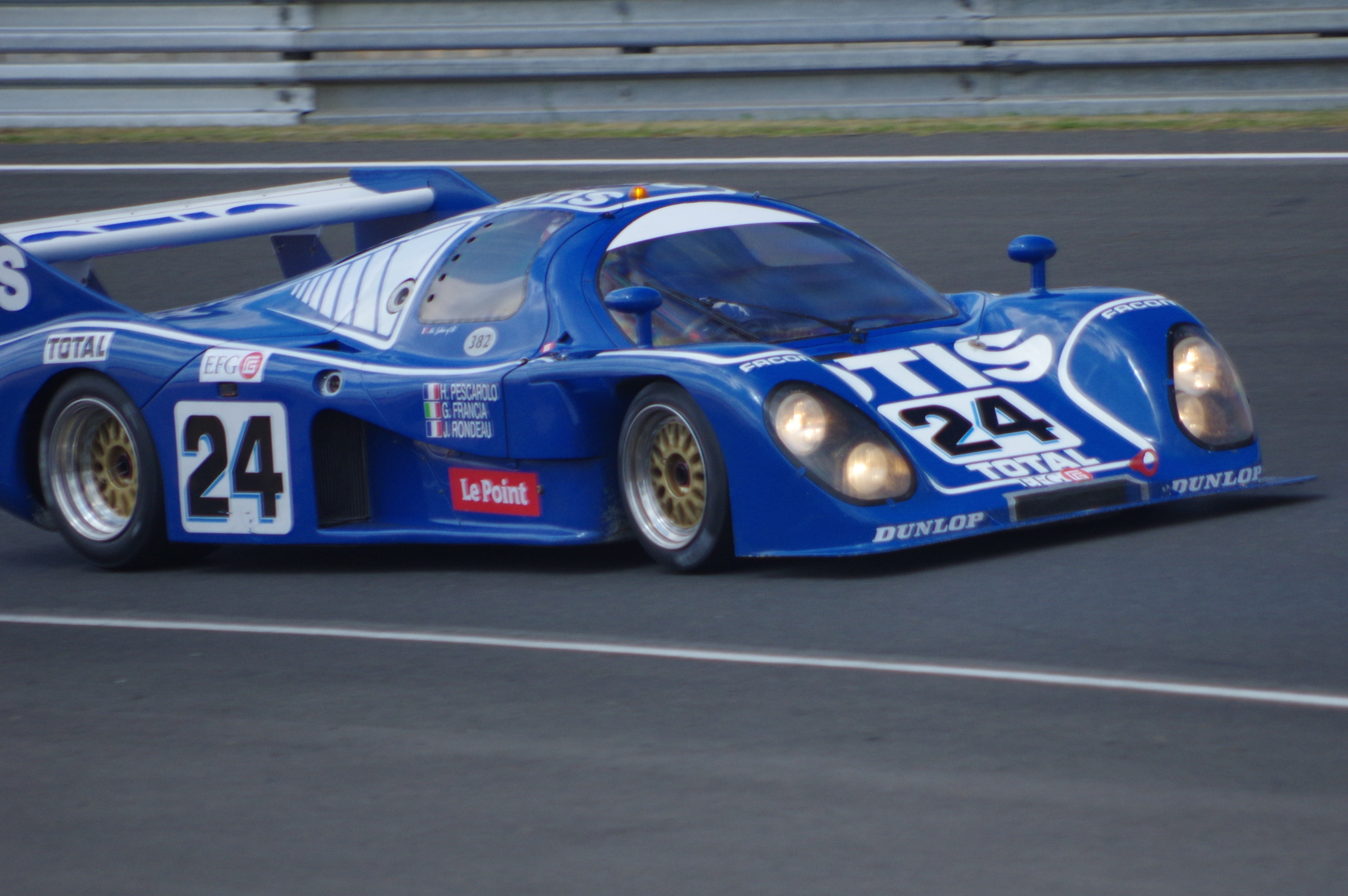 La Rondeau M382 au cours des Le Mans Classic 2016.